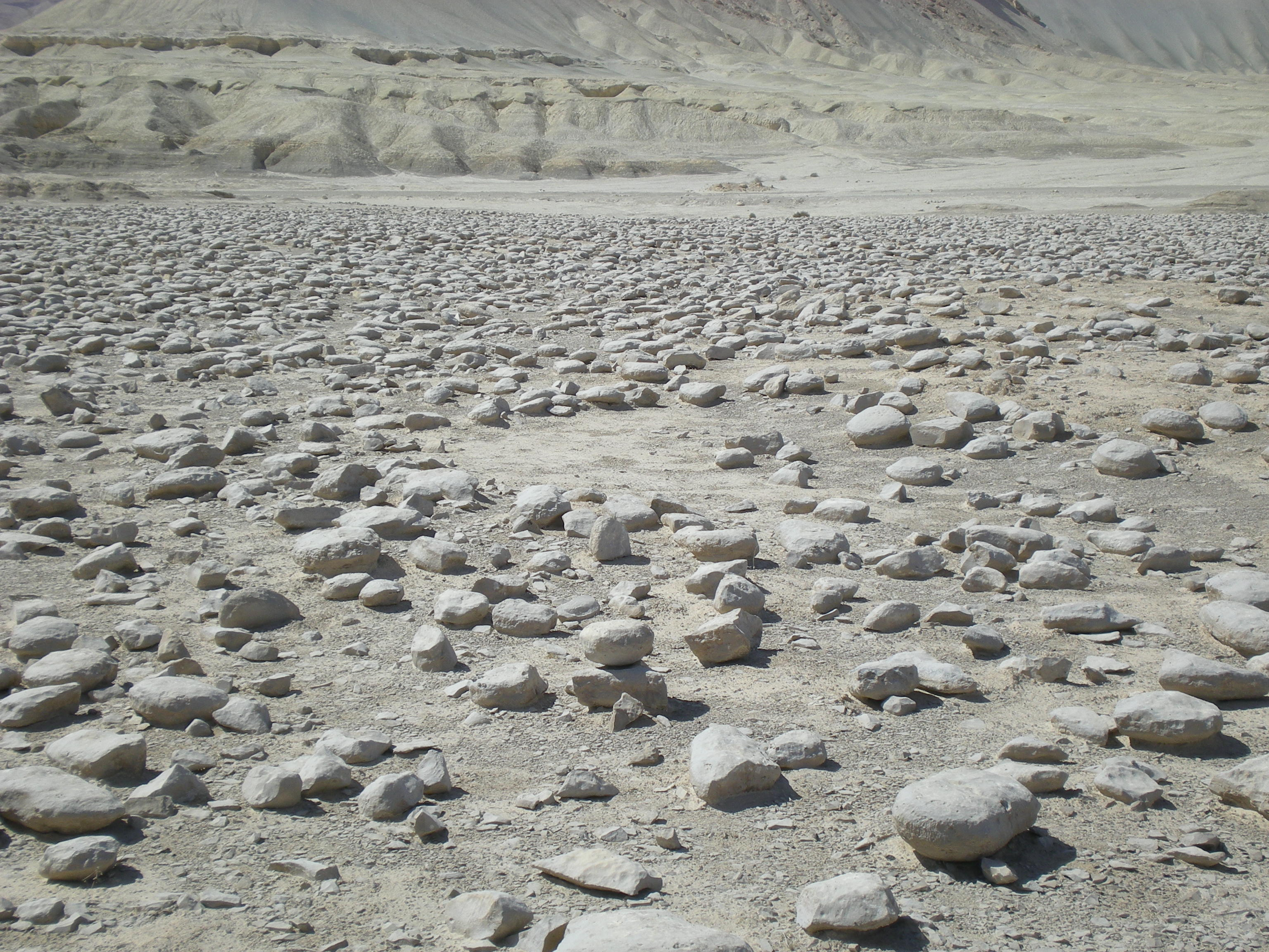 (So im englischen Reiseführer:Not far from the end of the trail is "Sde HaBulbosim" a field of round rocks that look like giant potatoes. Also nearby is En Zin.) - Kartoffelfeld